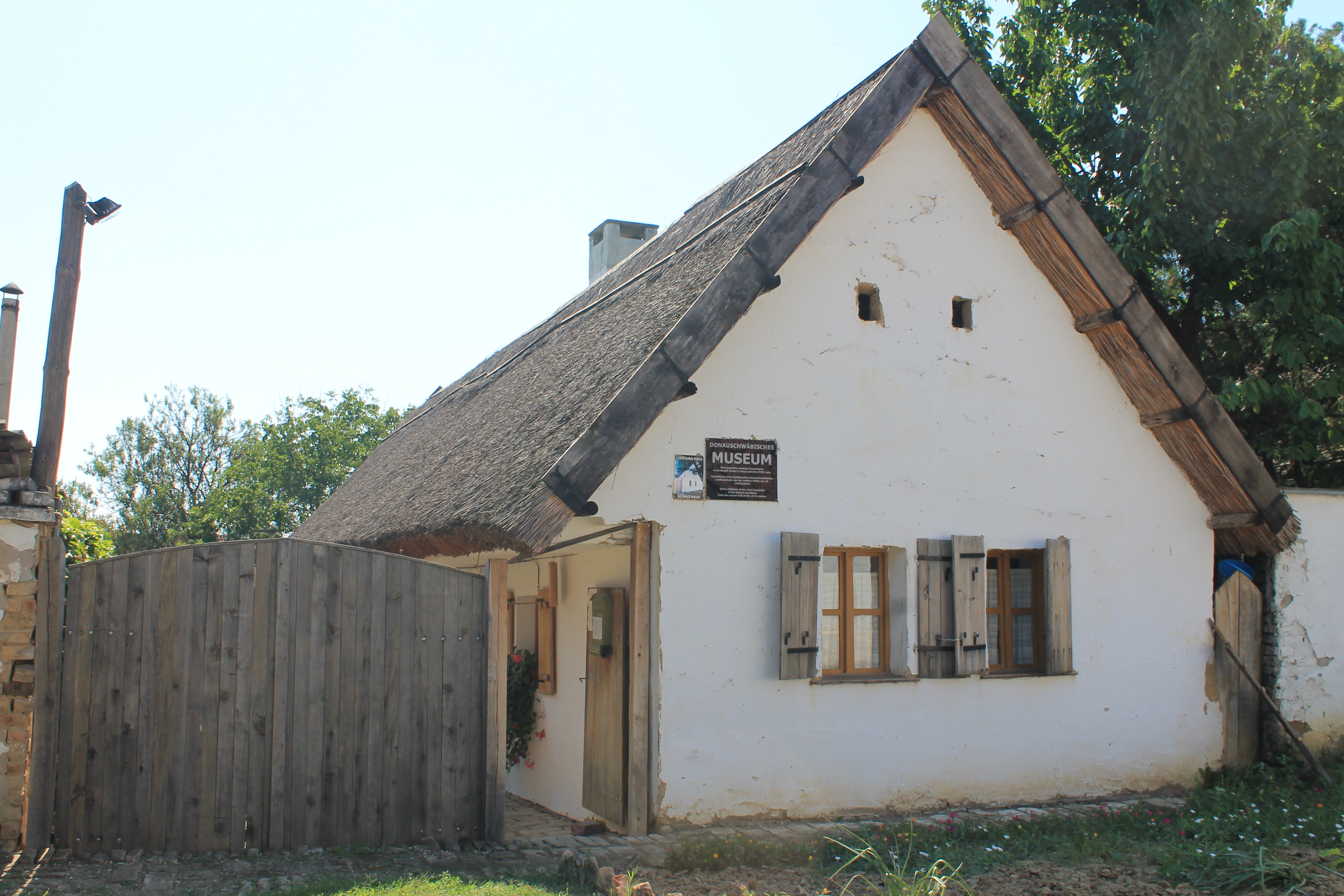 Muzej Podunavskih Švaba